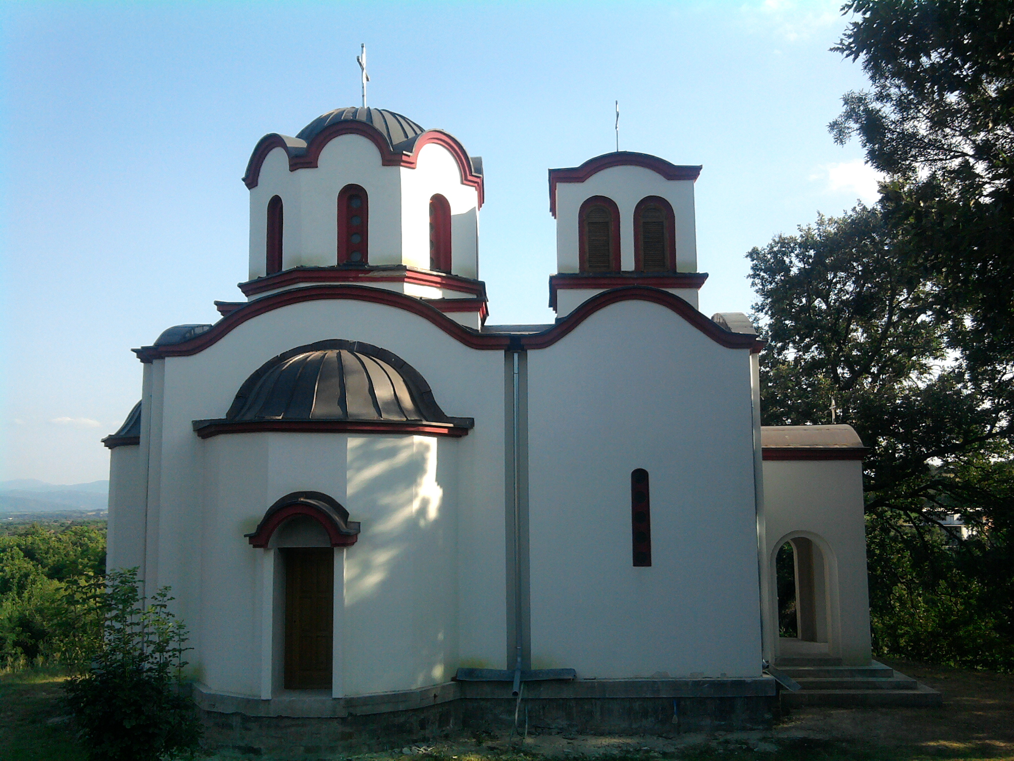 Crkva Svetog Jovana Krstitelja u naselju Kacapor, opstina Blace, Srbija.